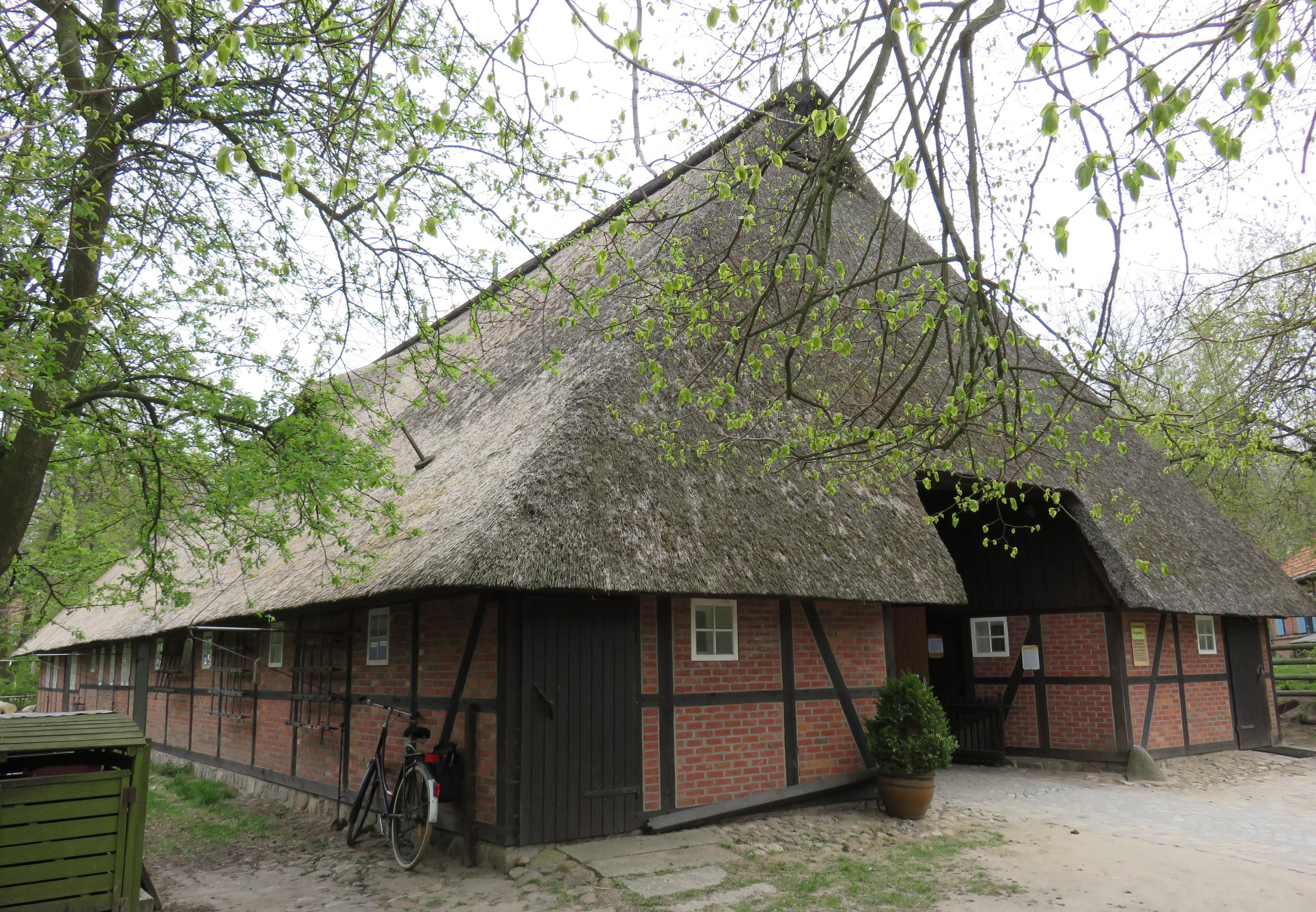 Wagnerhof im Museumsdorf Volksdorf This is a photograph of an architectural monument. (676)